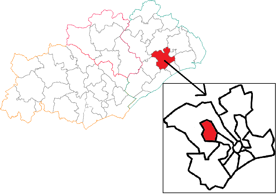 Situation du canton dans le département de l'Hérault.